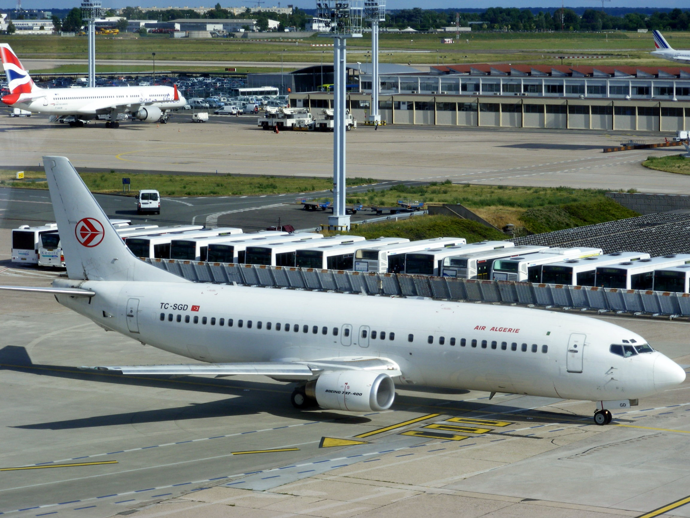 Air Algérie Boeing 737-400 TC-SGD @ Paris Orly